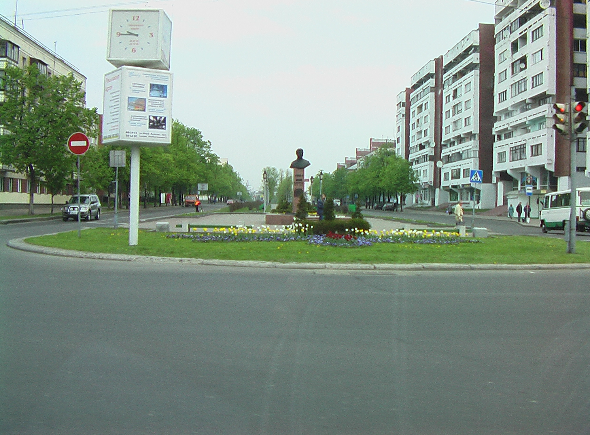 центр города Бреста